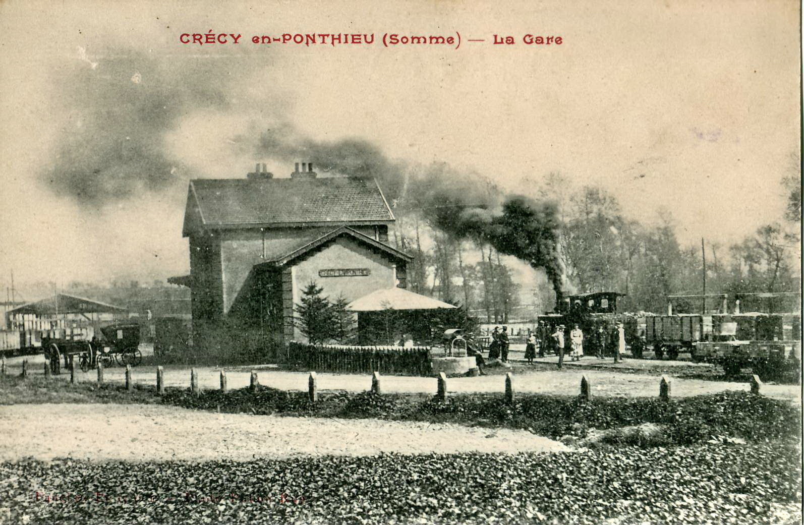 Carte postale ancienne éditée par FanelCrécy-en-Ponthieu (Somme) : la Gare des Chemins de fer départementaux de la Somme